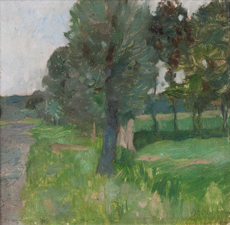 Bäume am Bach; Öl/Papier/Karton, 23,5 x 23,5 cm